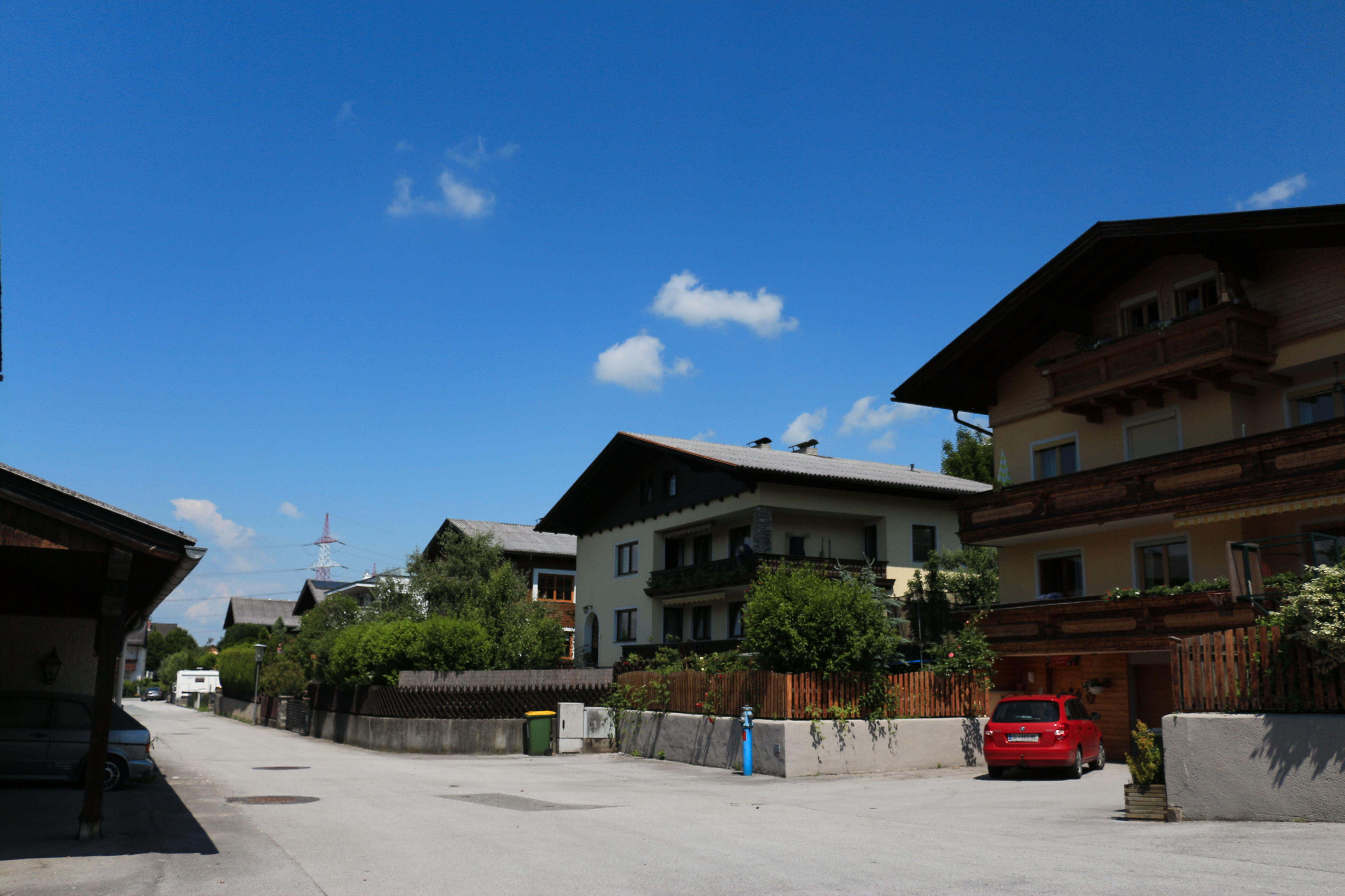 Wohngebiet Hagenau, Gemeinde Bergheim (Land Salzburg)